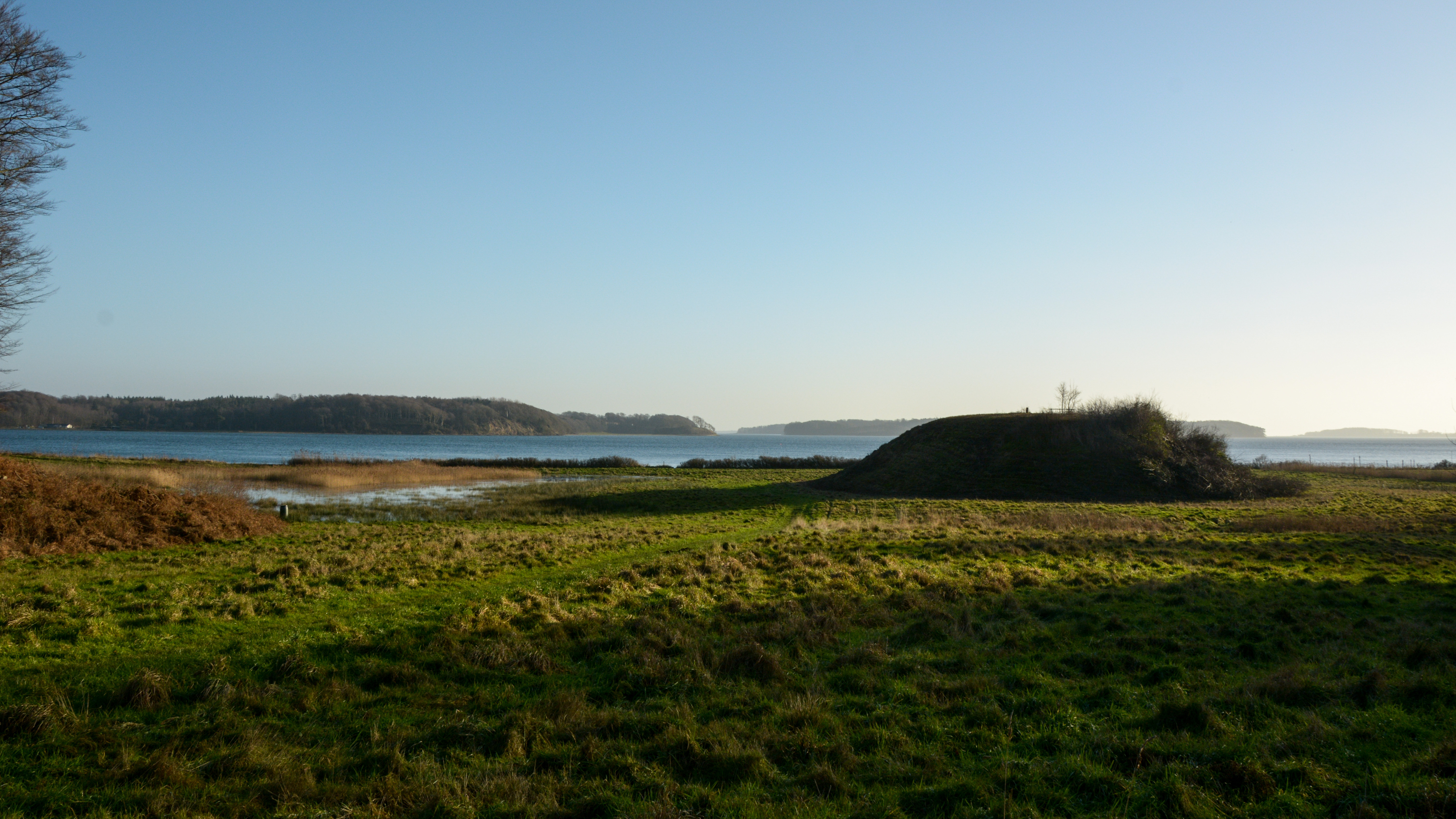 Høneborg voldsted, her har Hønborg slot ligget